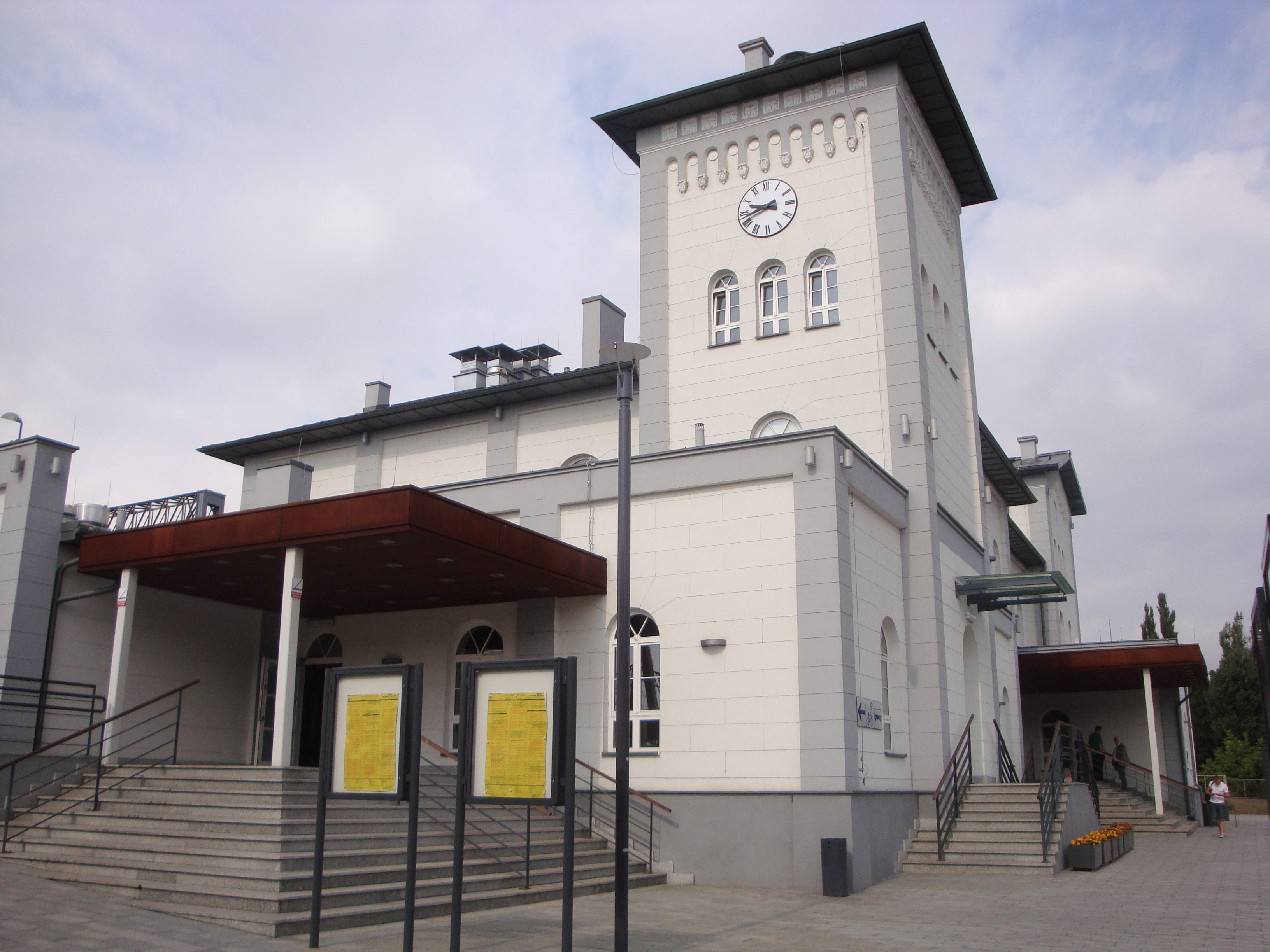 Dworzec kolejowy w Kutnie. This photo was taken during Railway Wikiexpedition 2013 set up by Wikimedia Polska Association.You can see all photographs in category Wikiekspedycja kolejowa 2013. English | polski | +/−